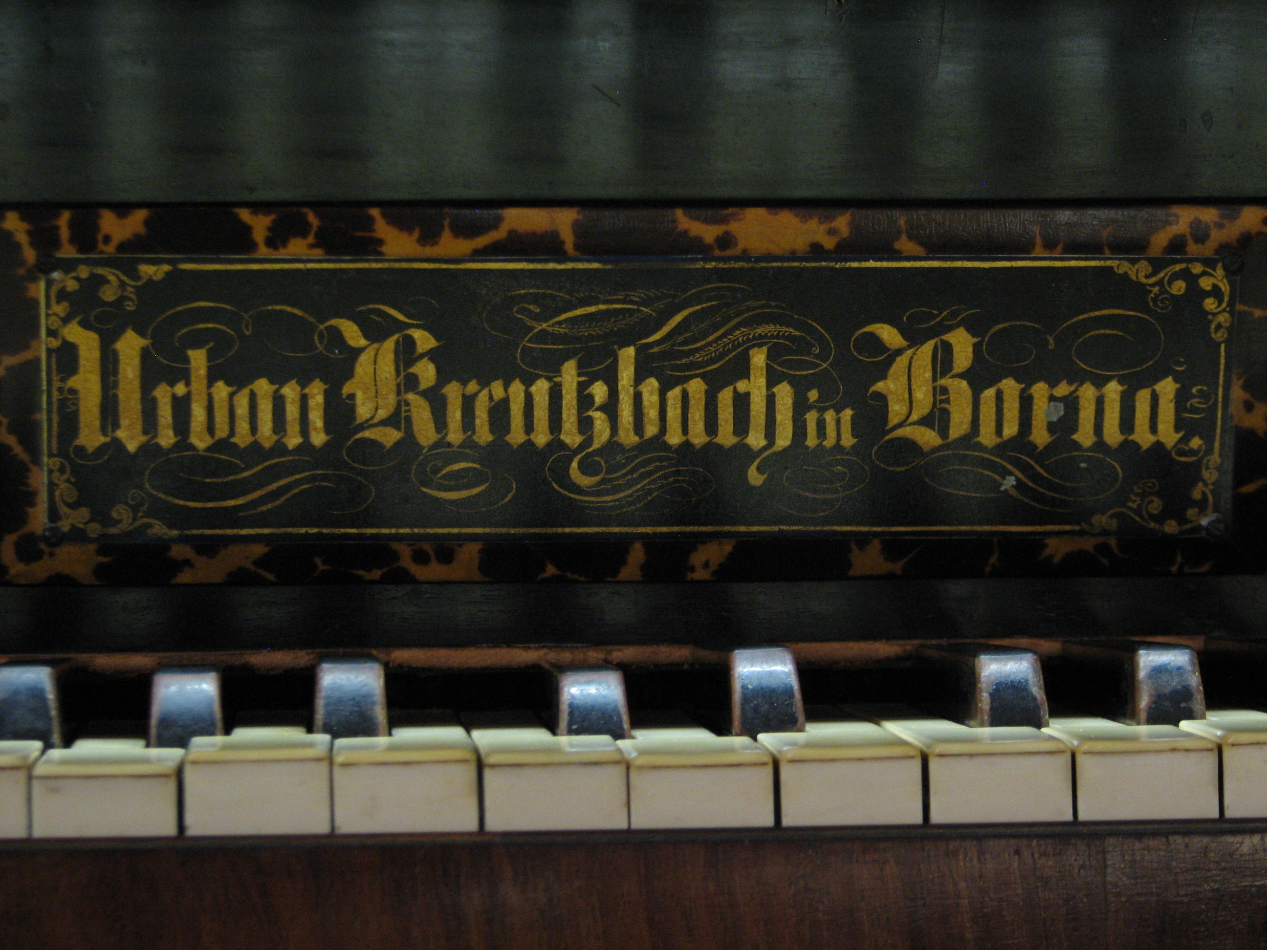 KircheSommerfeld08